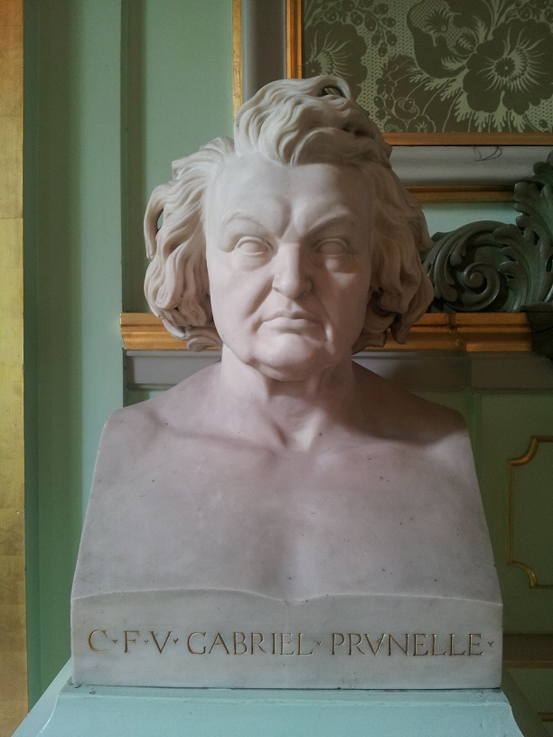 Buste en marbre de Victor Prunelle, ancien maire de Lyon, réalisé par Joseph-Hugues Fabisch.